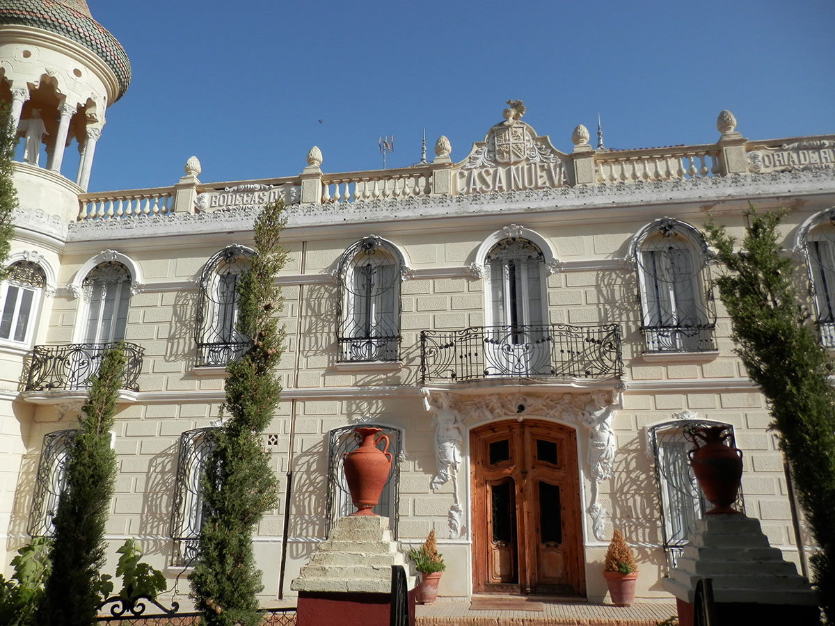 Finca Casa Nueva en Requena (Valencia).